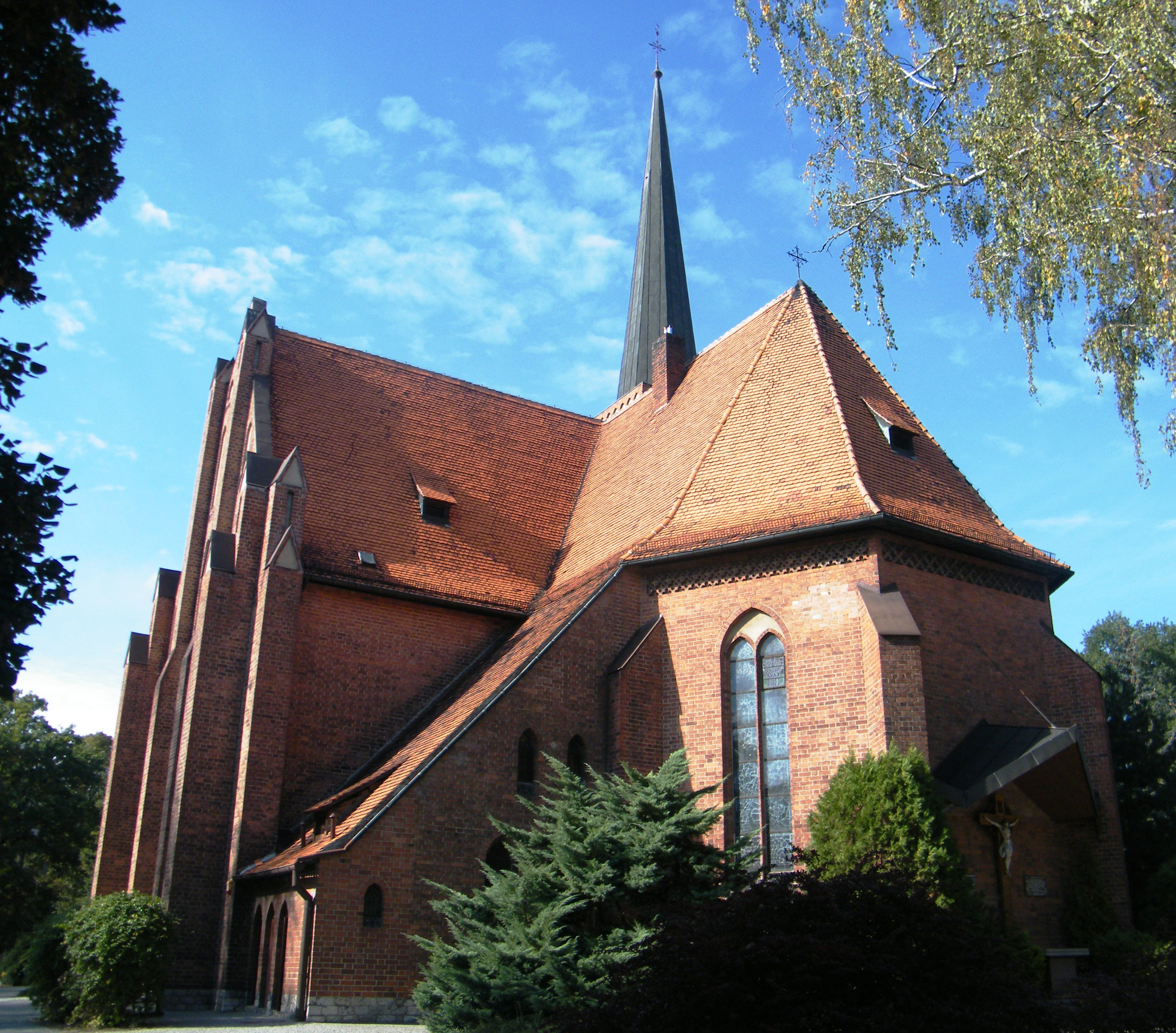 kościół par. p.w. Matki Bożej Wspomożenia Wiernych, 1911-13 Kluczbork, ul. Skłodowskiej 8, Kluczbork